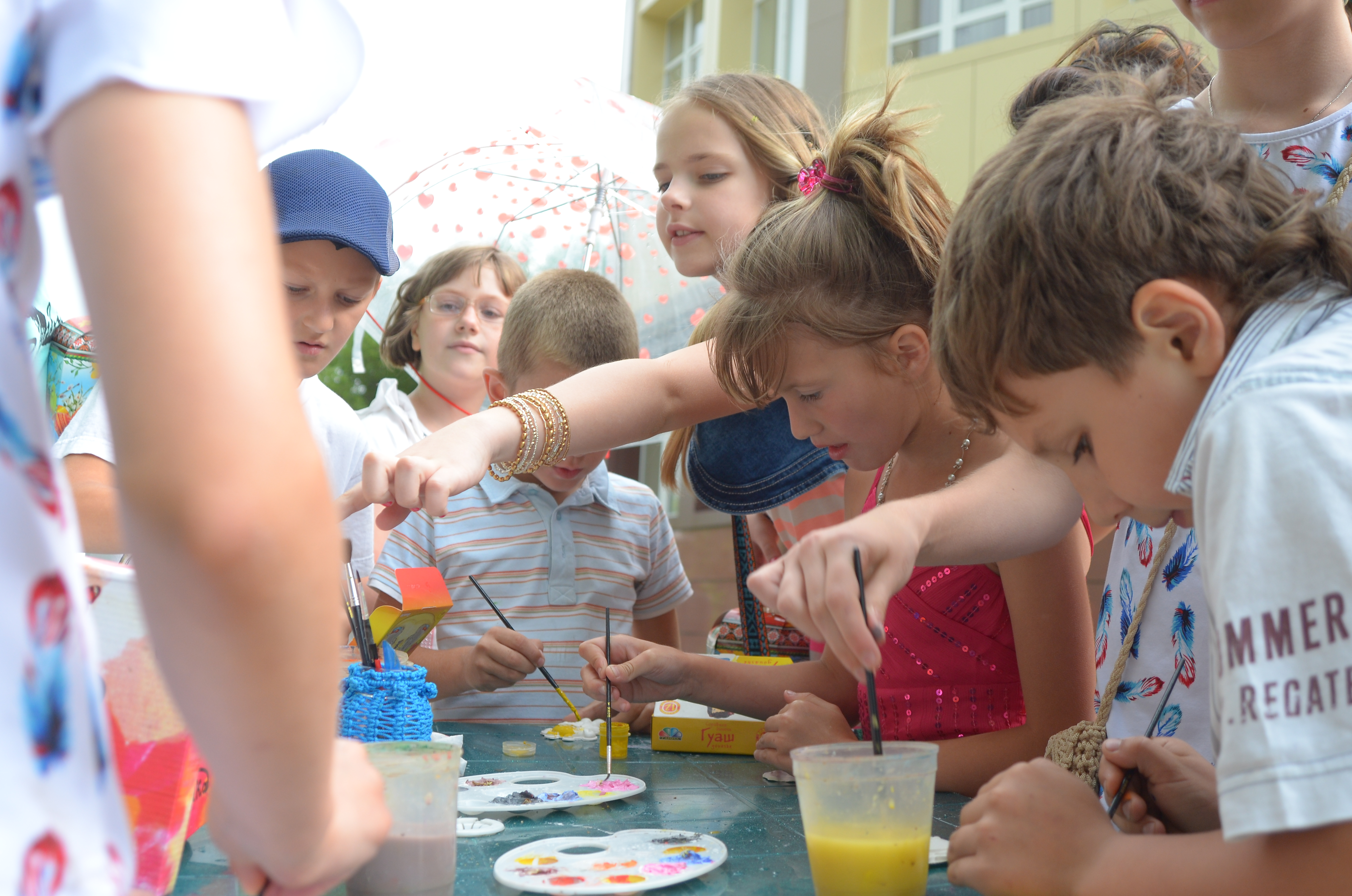 Донецк. Центр славянской культуры. День защиты детей.